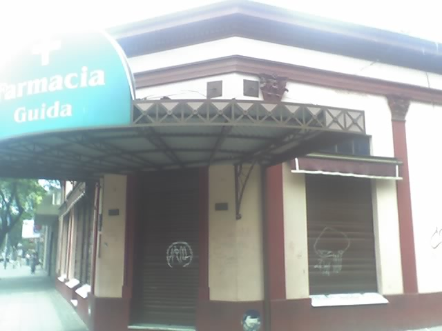 Casa histórica de Merlo en donde se reunió el primer gobierno municipal de Merlo en 1865.